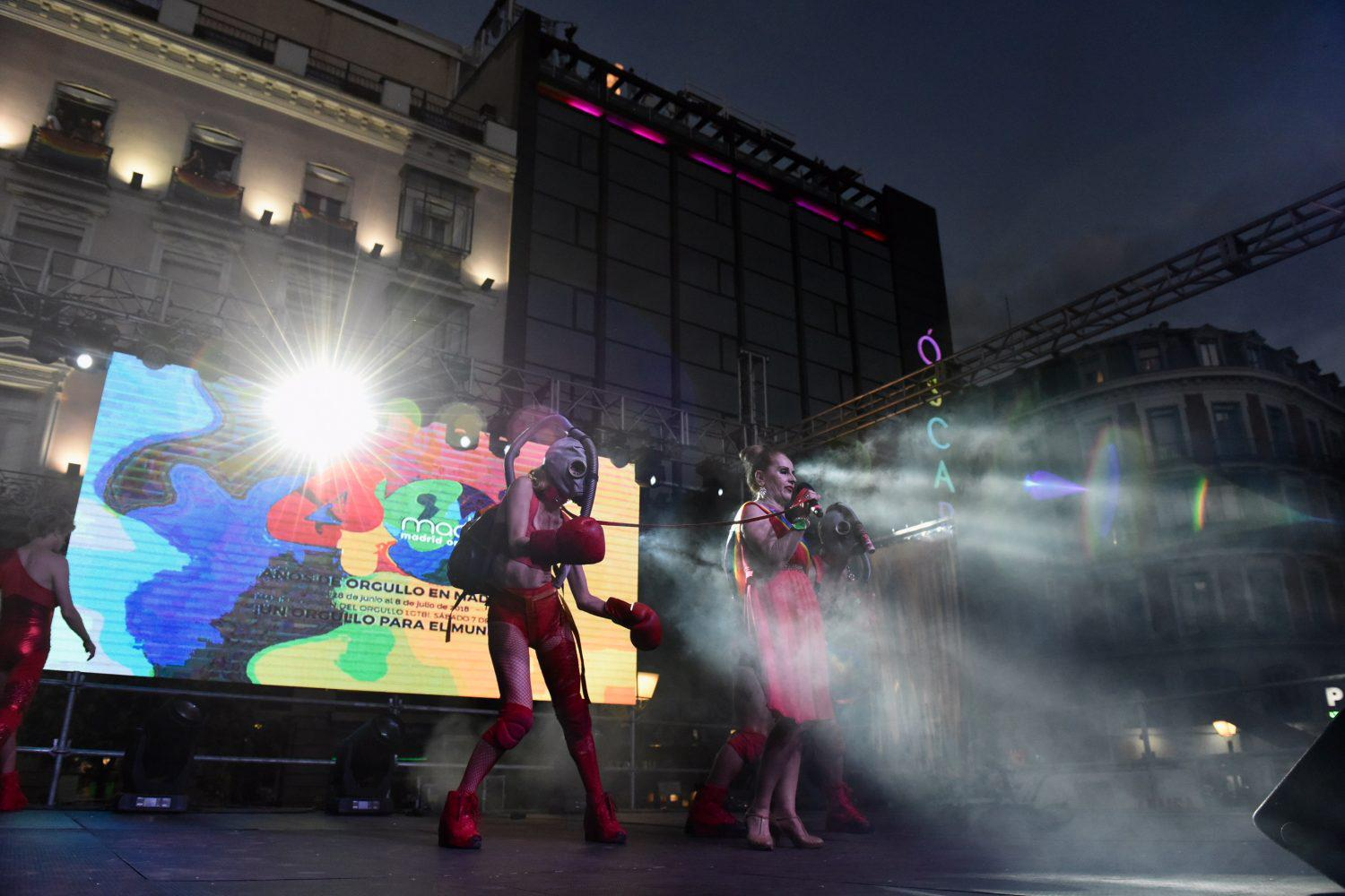 Arranca oficialmente el MADO Madrid Orgullo 2018 después de que anoche, miércoles 4 de julio, tuviera lugar el pregón en la plaza de Pedro Zerolo al que acudieron numerosos miembros de la corporación municipal.